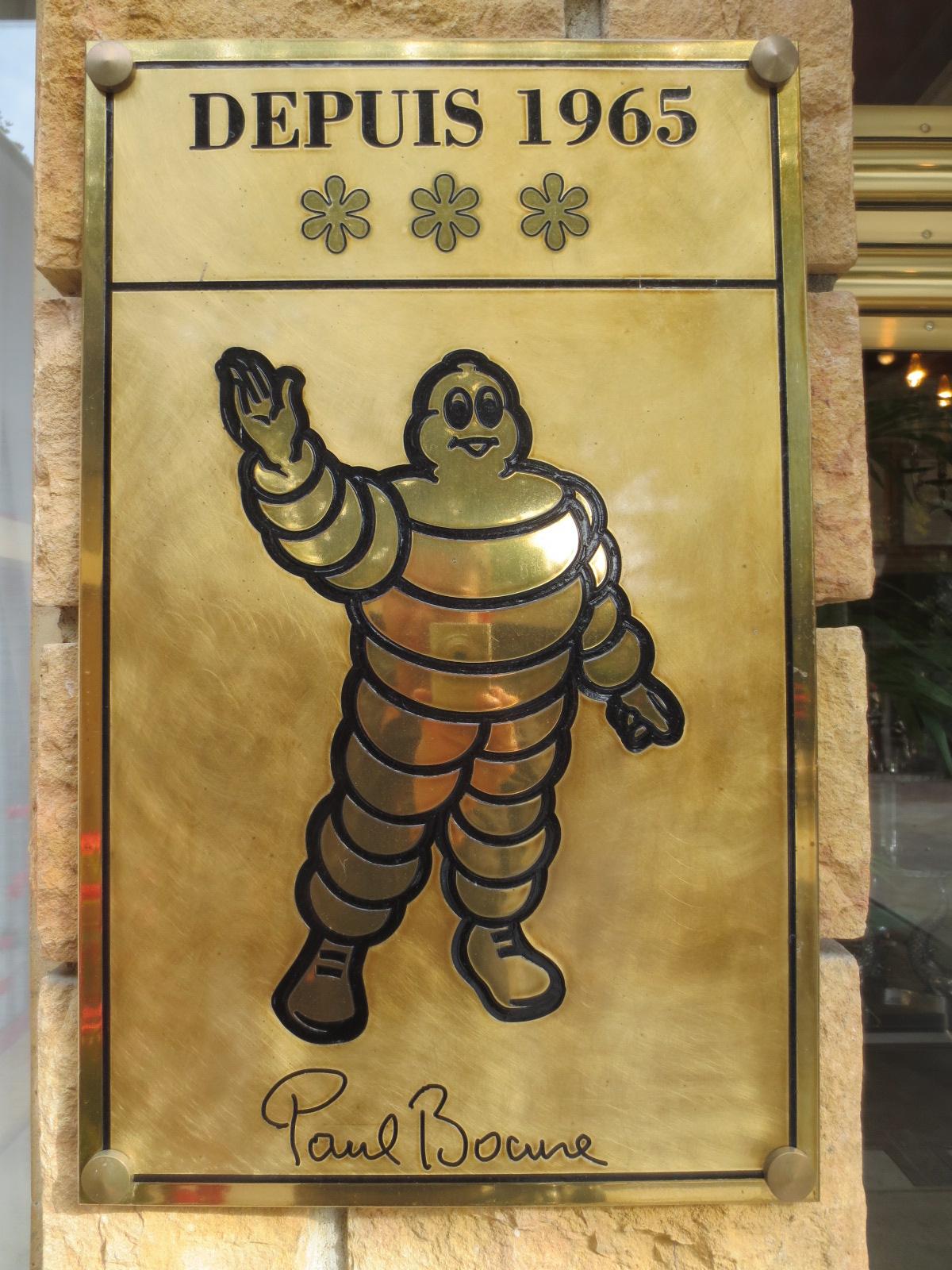 Paul Bocuse 3 étoiles au Guide Michelin depuis 1963